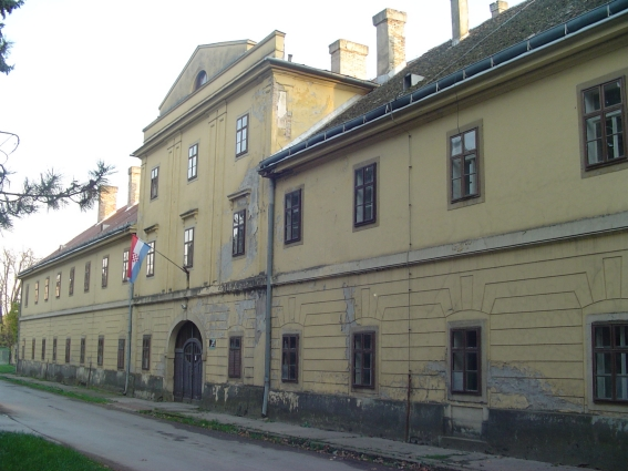 Dvorac u Kneževu